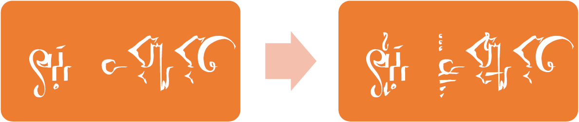 中文（中国大陆）: 有无分段星语时Ec Tisia的样子（右侧使用了分段星语）